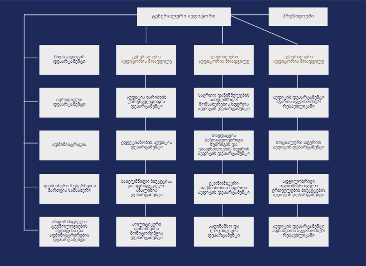 სახელმწიფო აუდიტის სამსახურის სტრუქტურა 2018 წლის მონაცემებით